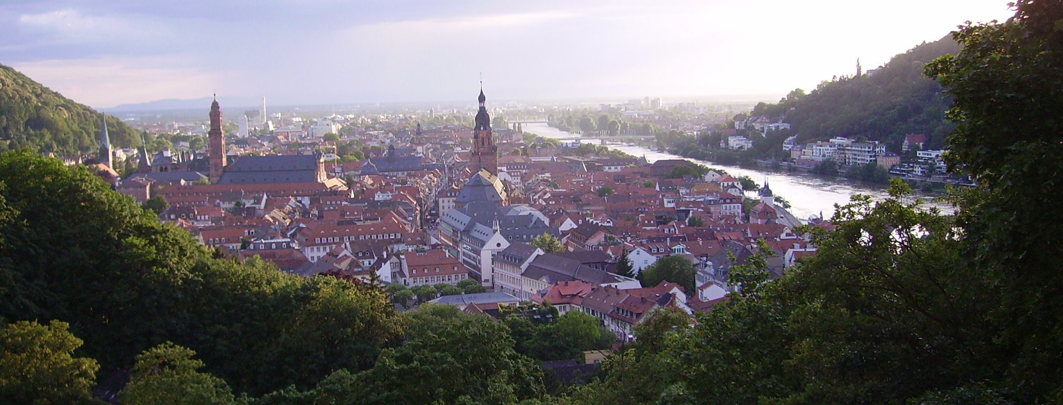 view of Heidelberg Castle